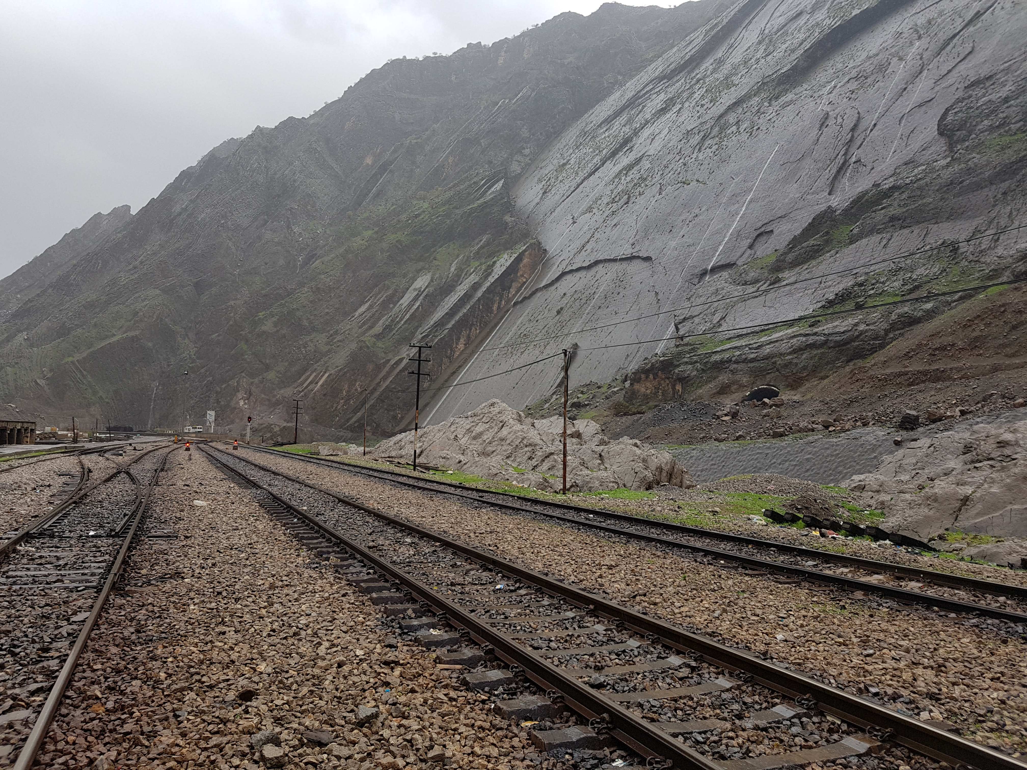 این عکس در ایستگاه تنگ 5 در یک روز بارانی ثبت شده است